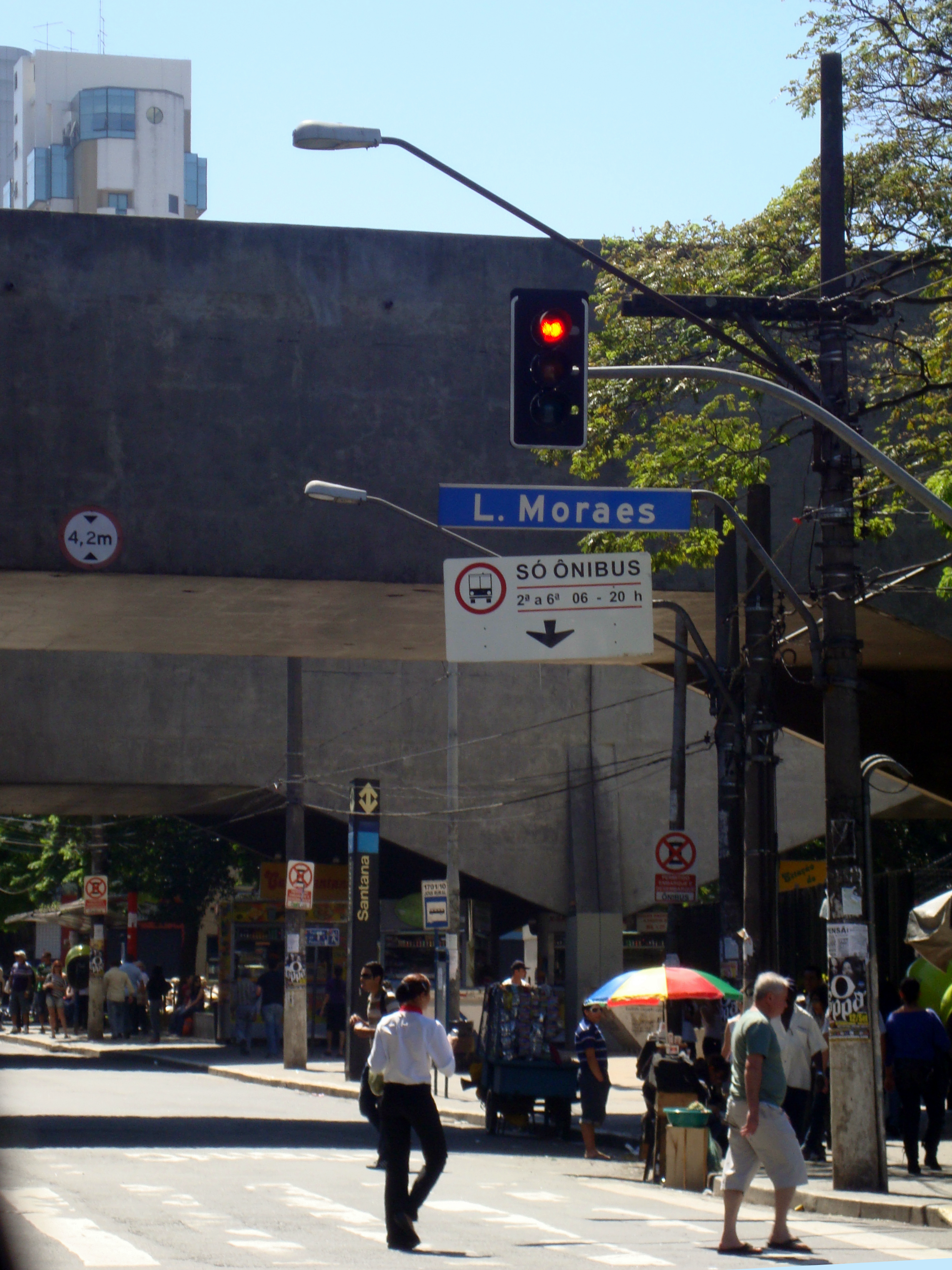 Cotidiano do bairro de Santana em São Paulo/SP